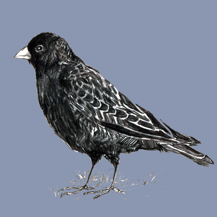 Tekening van Zwarte leeuwerik